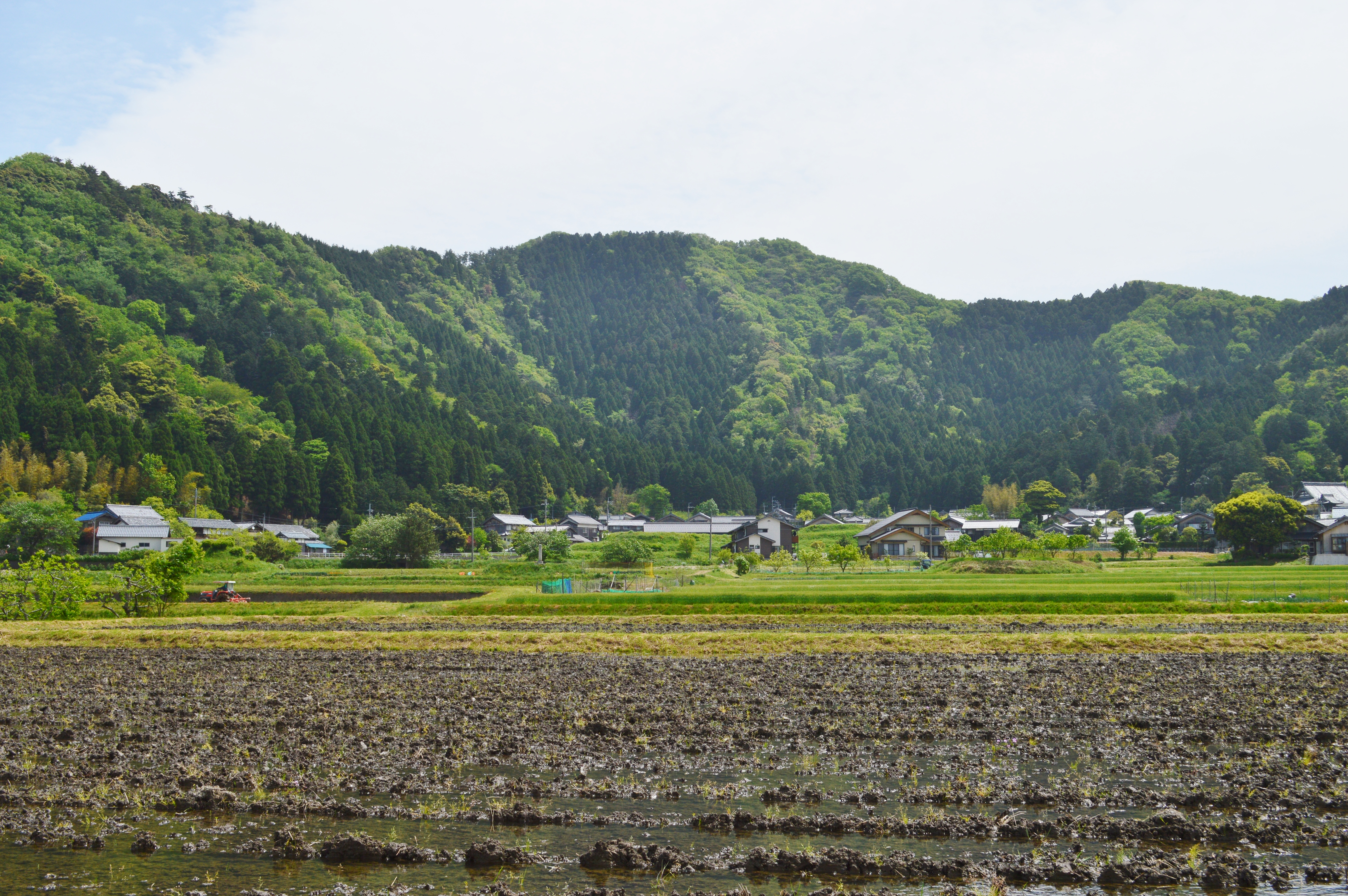 脇袋古墳群 全景